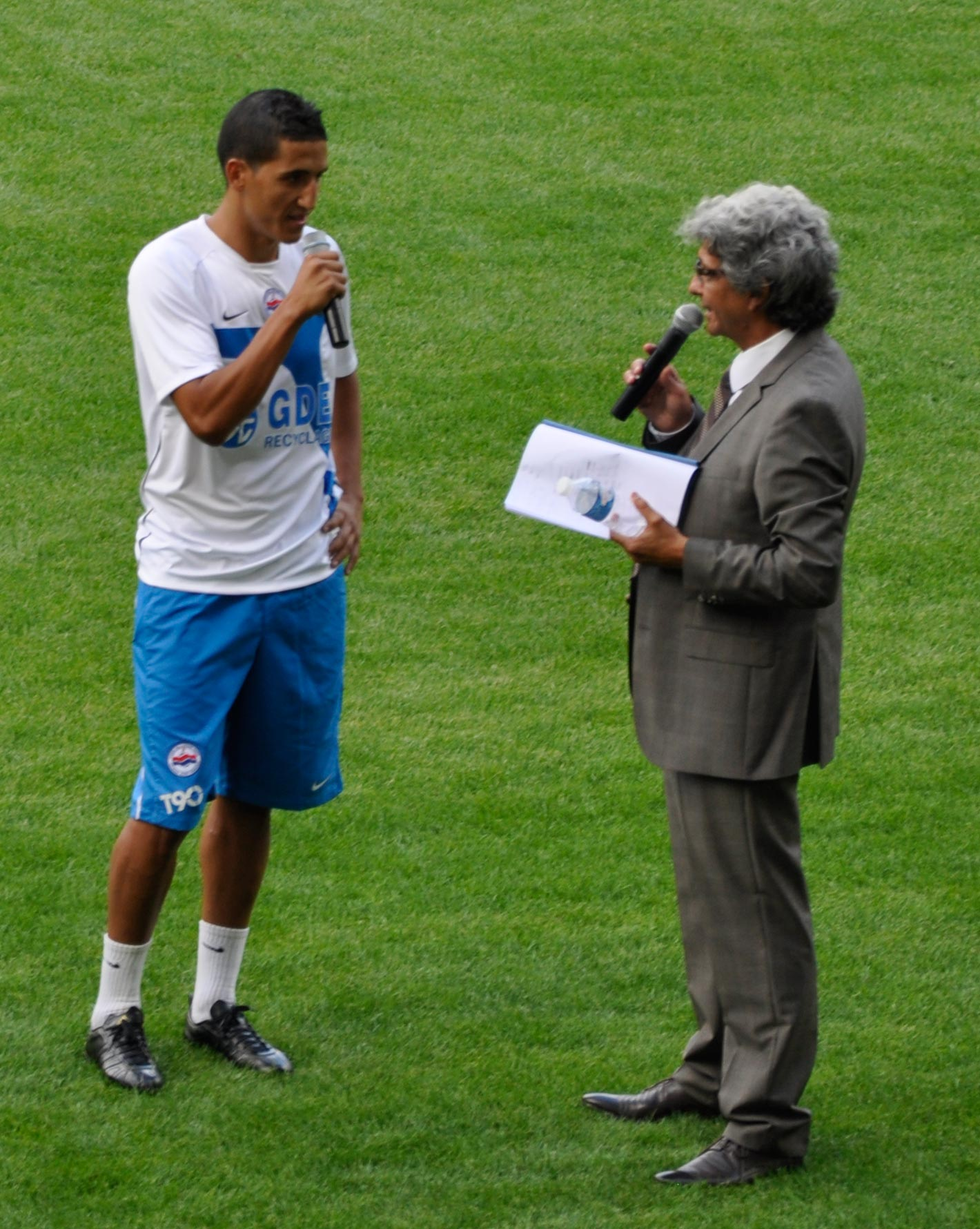 Faycal-fajr lors de la présentation de l'équipe 2011-2012 du Stade Malherbe Caen